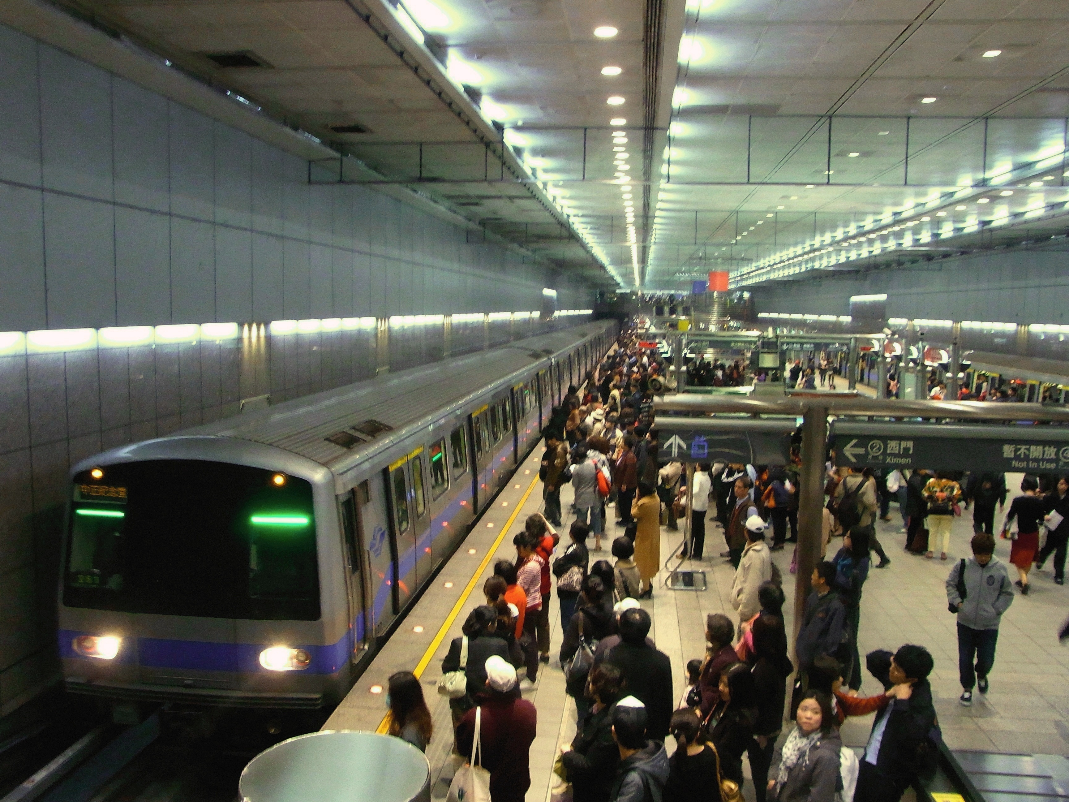 一列抵達台北捷運中正紀念堂站第二月台的小南門線列車，列車類型為第二代371型電聯車。